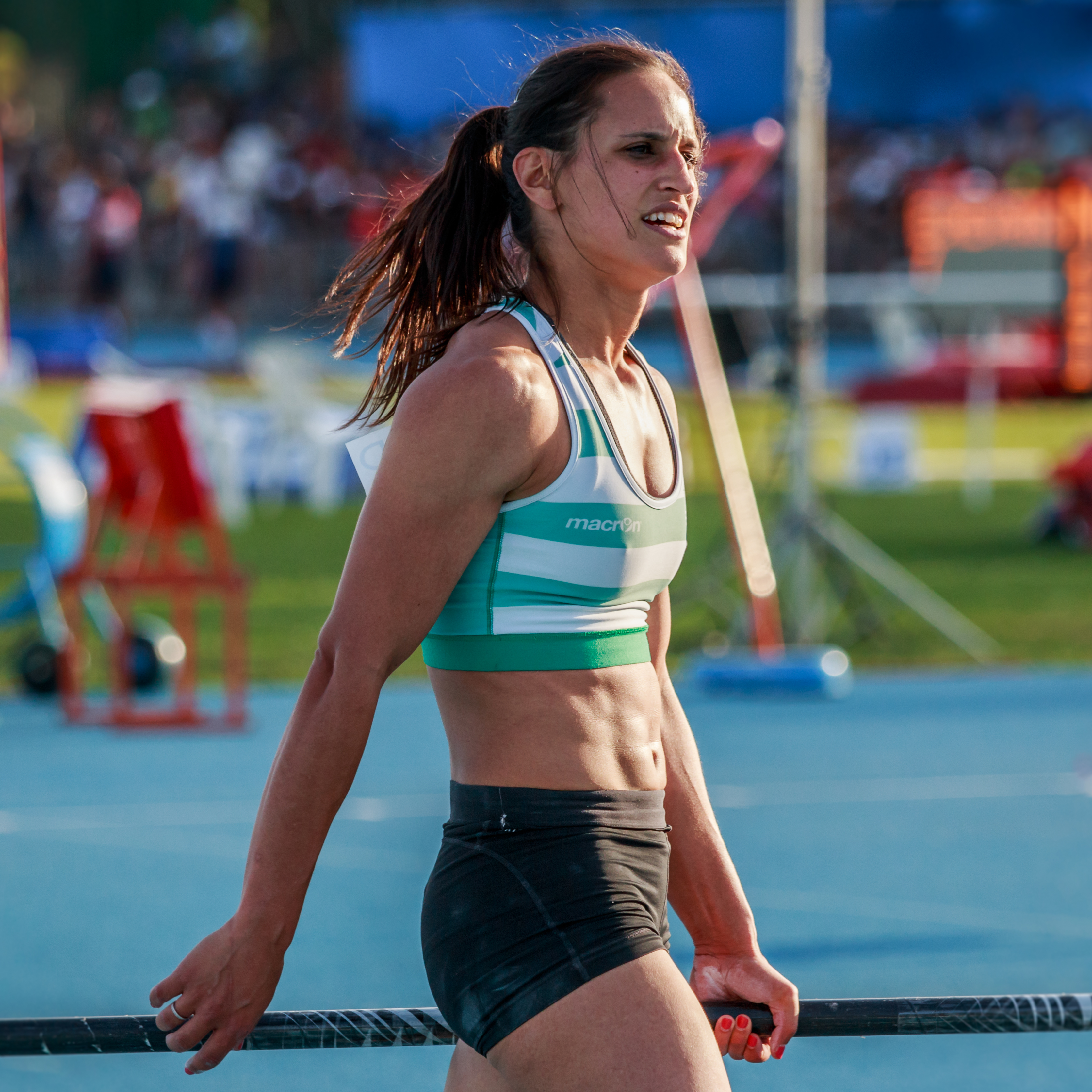 Marta Onofre (POR). Salto con garrocha. IAAF World Challenge. Meeting Madrid 2017. Moratalaz, Madrid.